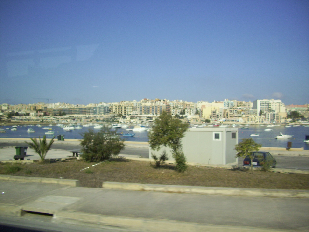 Il lungomare di Bugibba